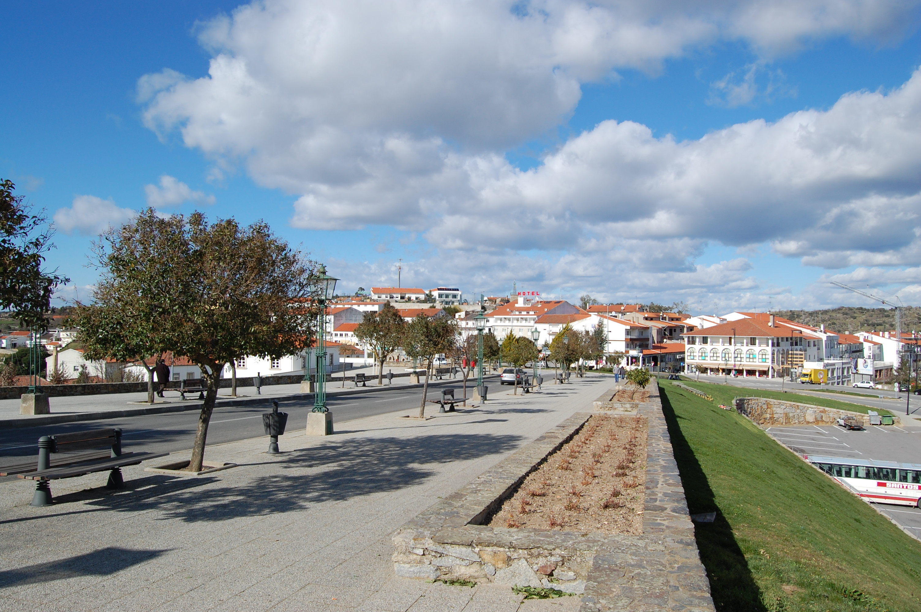 Miranda do Douro, Portugal.